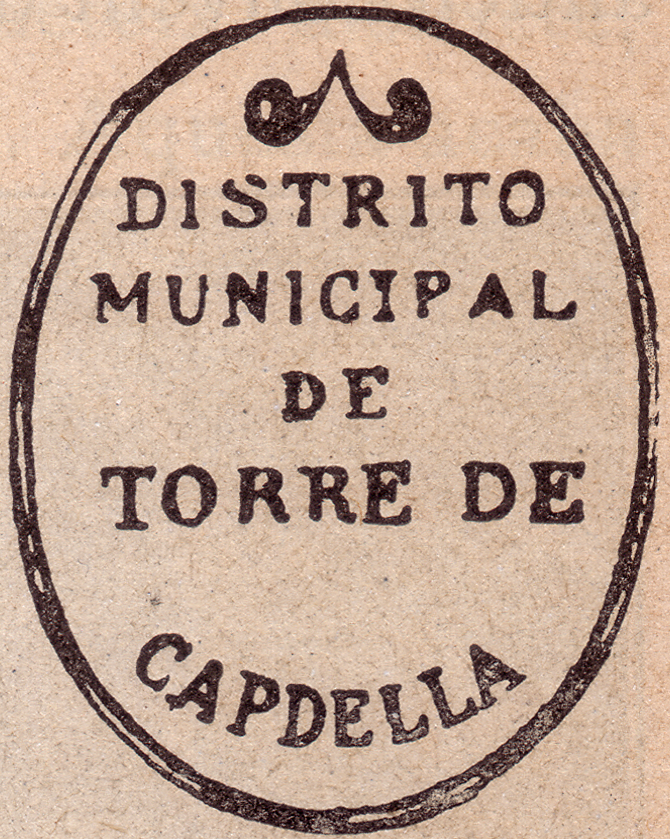 Segell municipal antic de la Torre de Cabdella (Pallars Jussà)